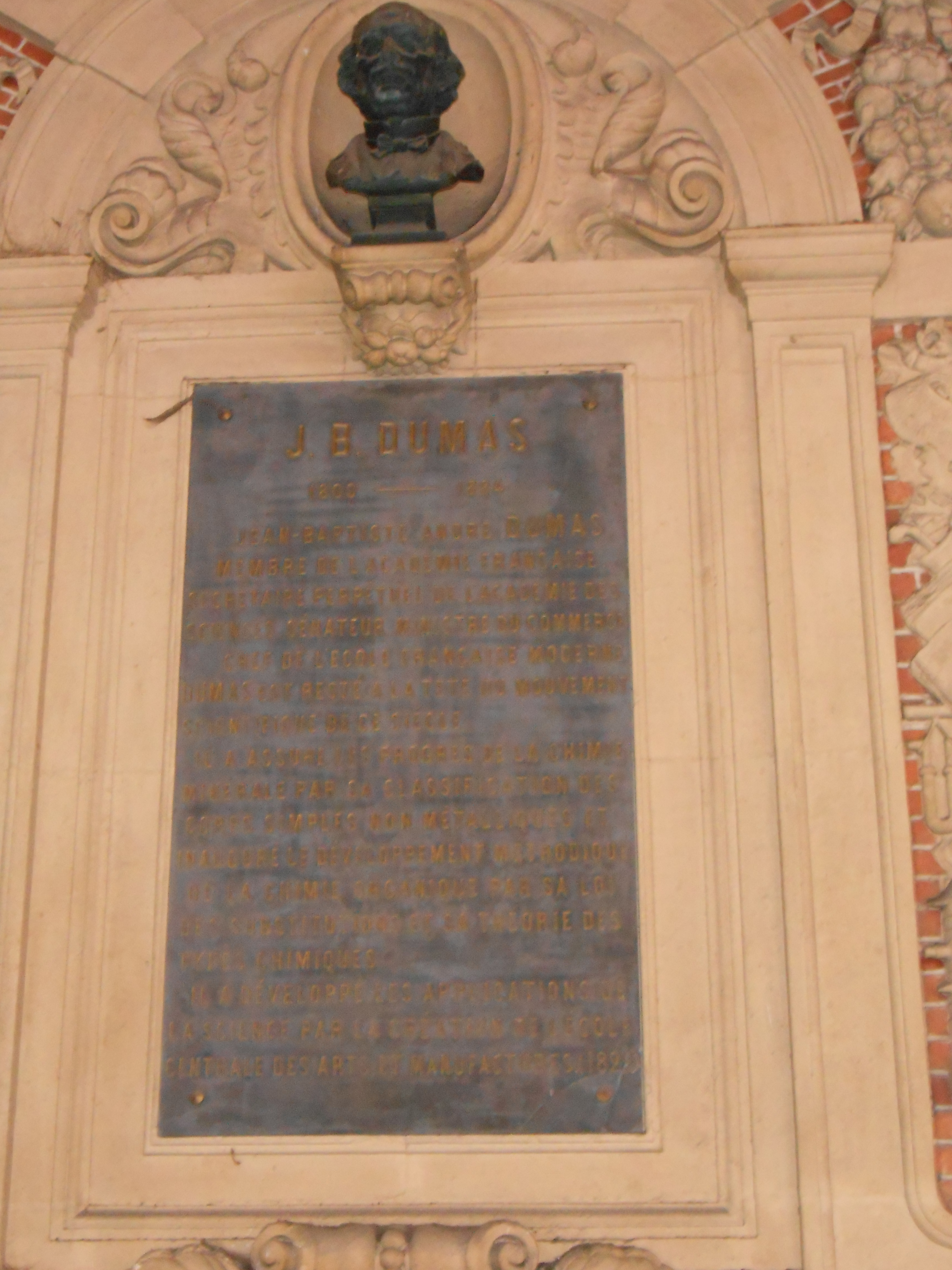 Buste de Jean Baptiste Dumas, chimiste, académicien, co-fondateur de l'Ecole centrale, envoyé de Napoléon à Lille en Octobre 1853